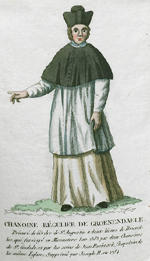 Collection de costumes de tous les ordres monastiques, supprimés à differentes époques, dans la ci-devant Belgique, Bruxelles, Philippe Joseph Maillart et sœur, 1811